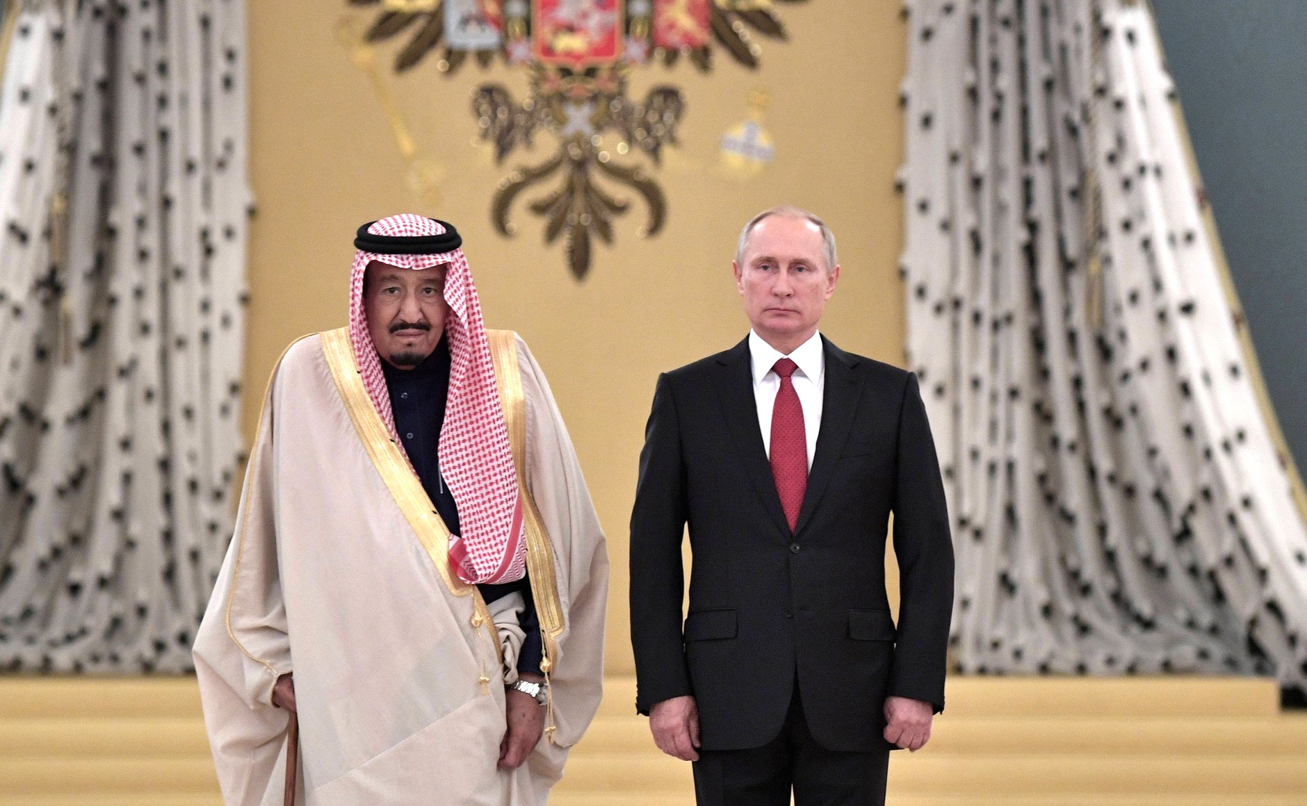 Официальная церемония встречи. Президент России Владимир Путин с Королём Саудовской Аравии Сальманом Бен Абдель Азизом Аль Саудом. Москва, Кремль.